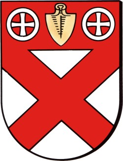 Wappen des ortes Schwarmstedt